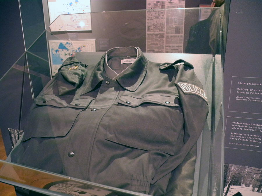 Izložba Domovinski rat u Hrvatskom povjesnom muzeju tijekom Noći muzeja.